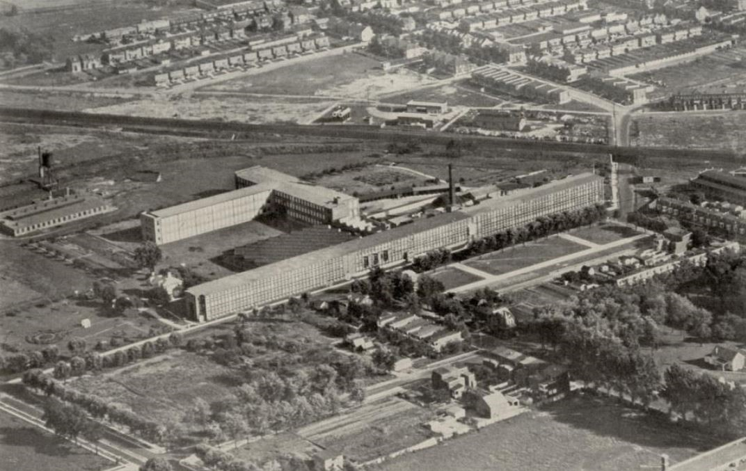 Stehli Seiden AG, Lancaster (Pennsylvania) , Vereinigte Staaten